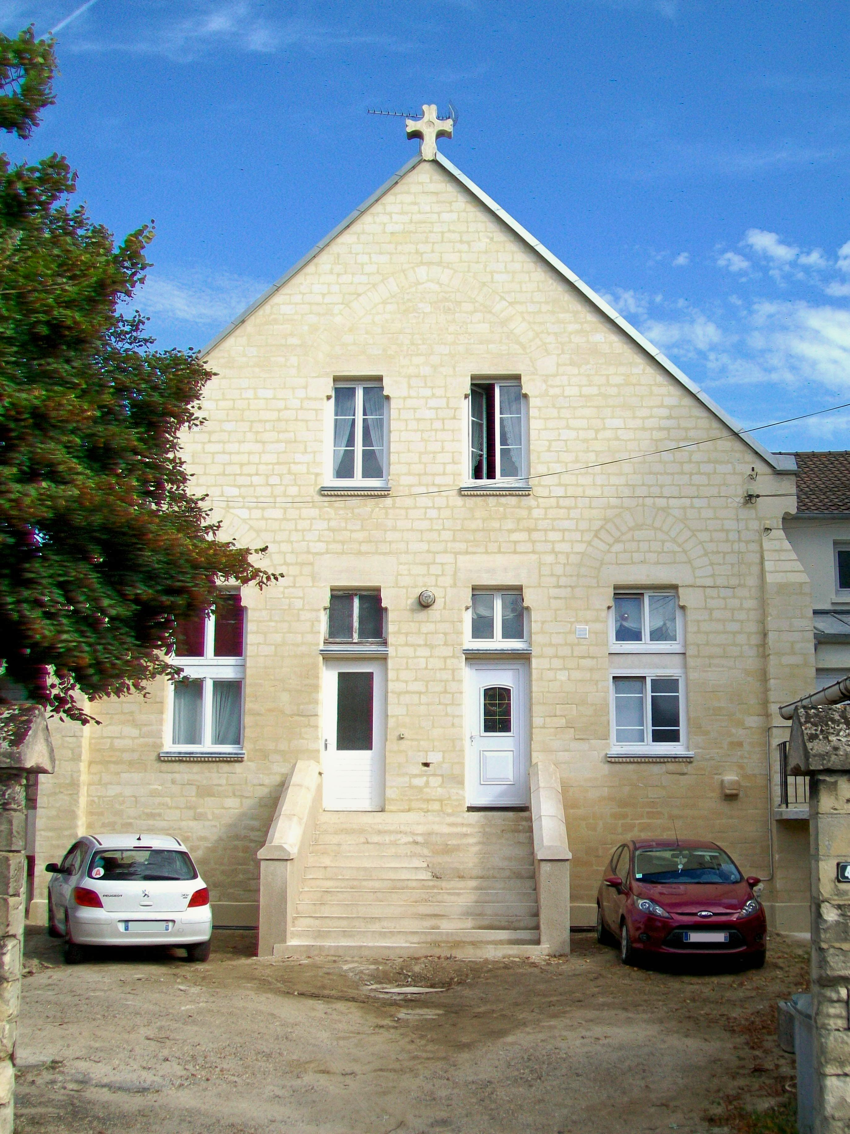 L'ancienne école des Montebello, ouverte en 1872 et fermée en 1902, Grande rue.